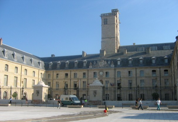 Dijon : palais des ducs, vu de la place de la Libération